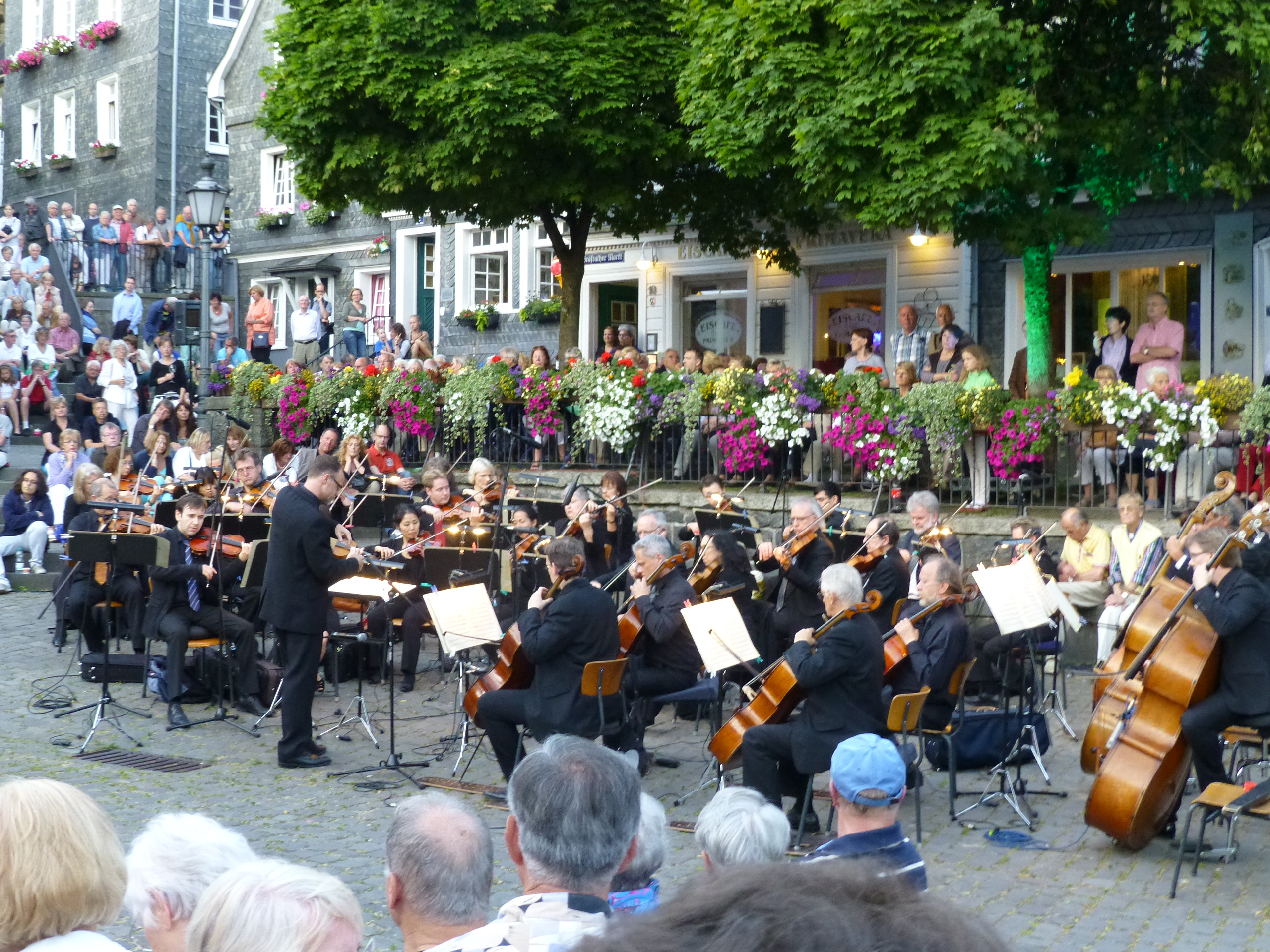 Open-Air-Konzert der Bergischen Symphoniker am 20. Juli 2013 ab 21:00 auf dem Gräfrather Marktplatz, Solingen.